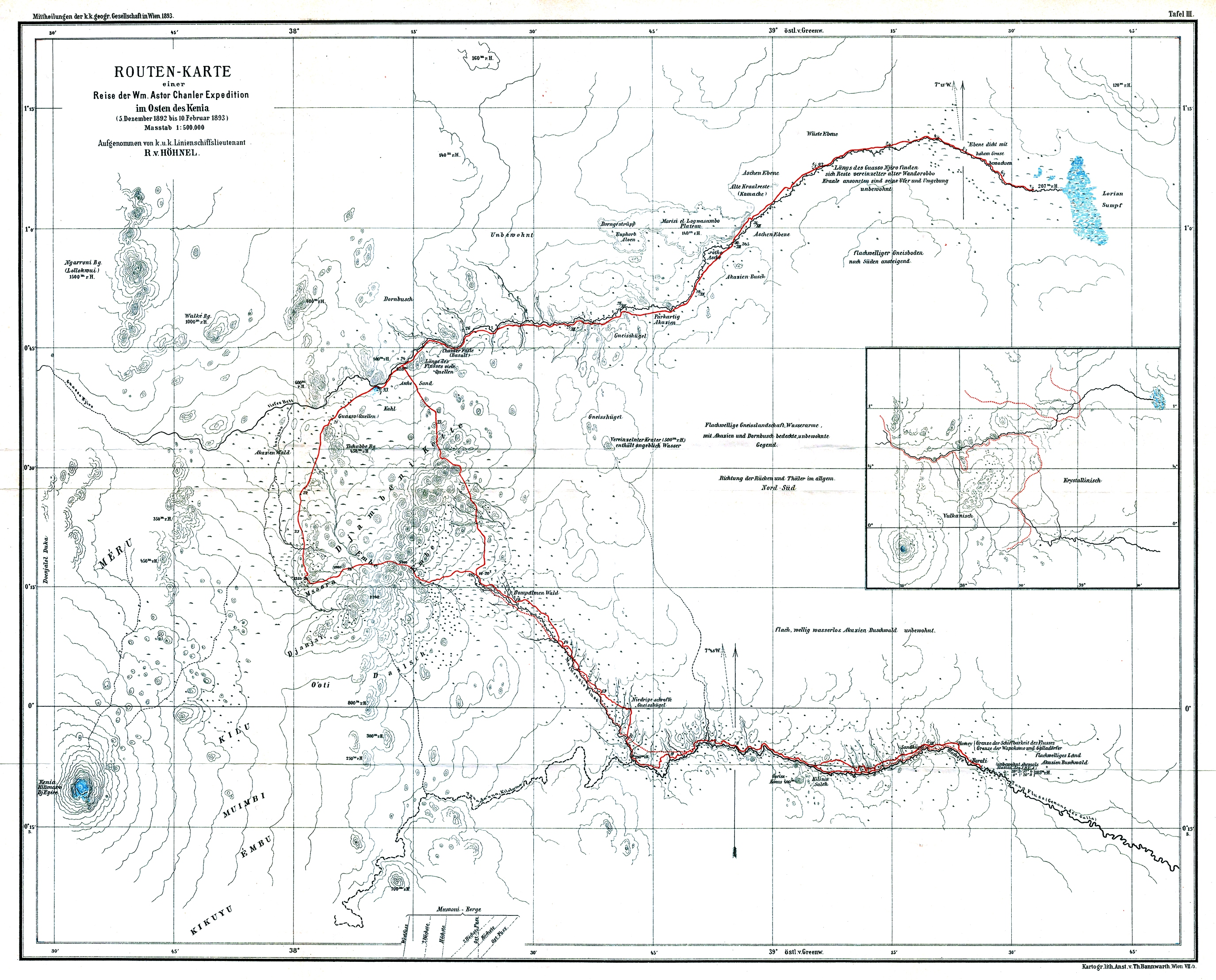 Routen-Karte einer Reise der Wm. Astor Chanler Expedition im Osten des Kenia (5. Dezember 1892 bis 10. Februar 1893).